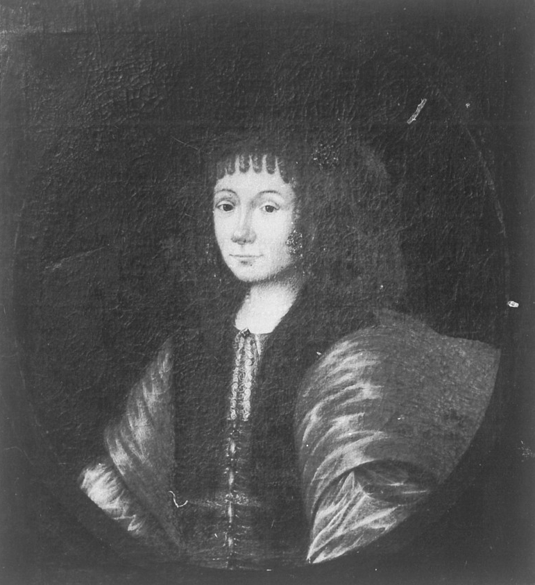 Anna Pogwisch, geborene Rantzau, 1654/1722, Rastorf Kreis Plön, Gut, Herrenhaus, Ölgemälde